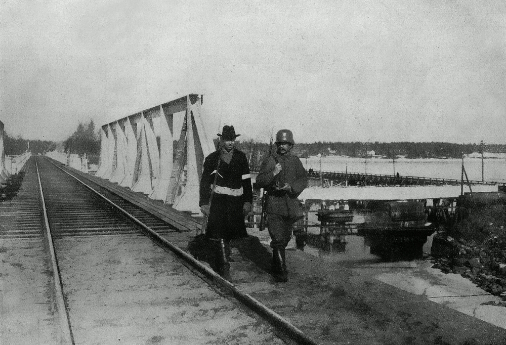 Gemeinsamer Bahnschutz.